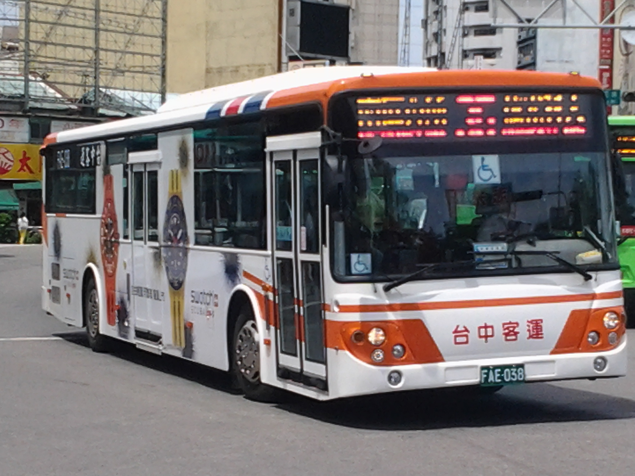 台中客運2012年DAEWOO DL08S（成運汽車）